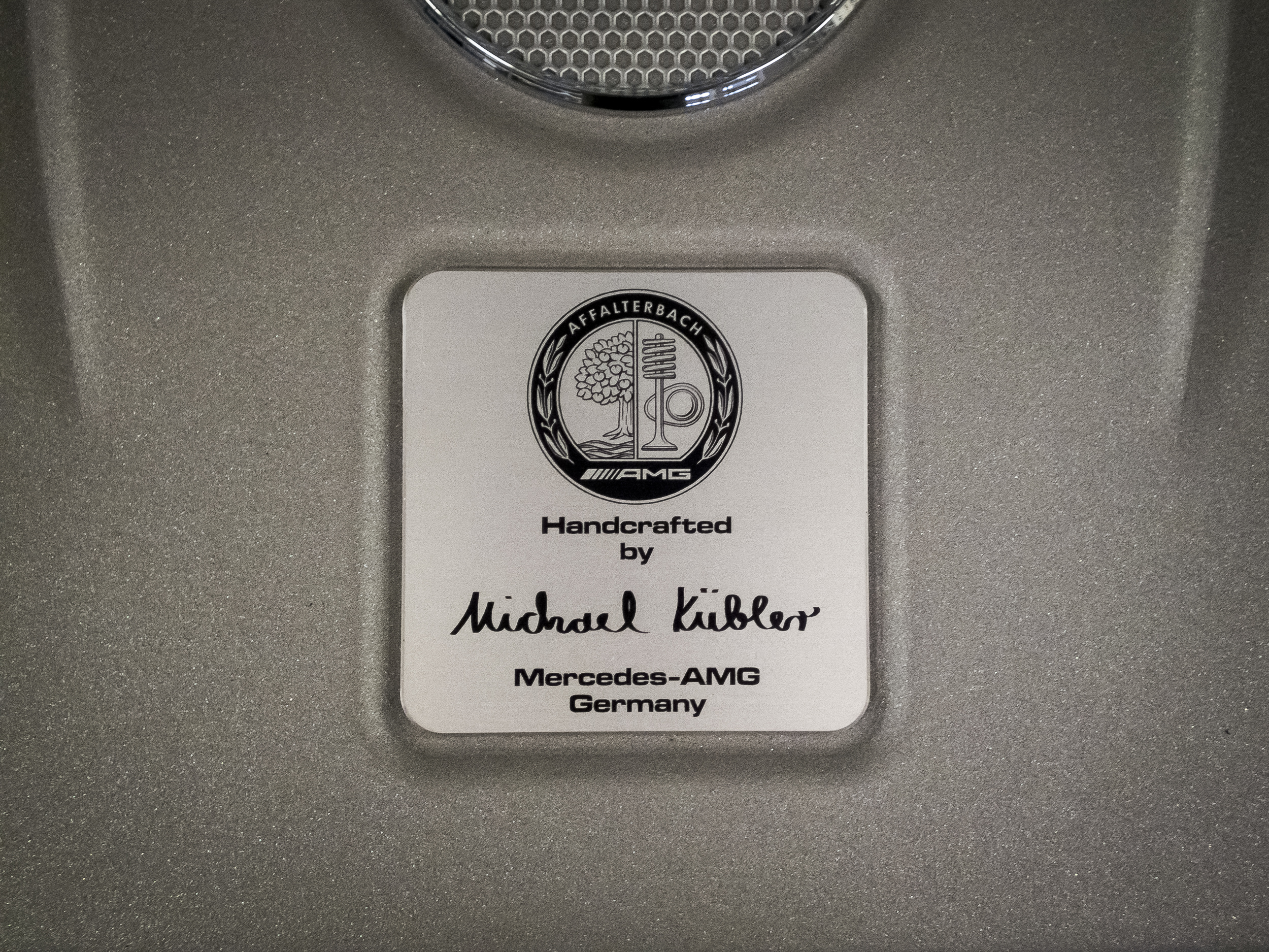 Plakette mit Signatur des Monteurs auf einem Mercedes-AMG Motor 279.